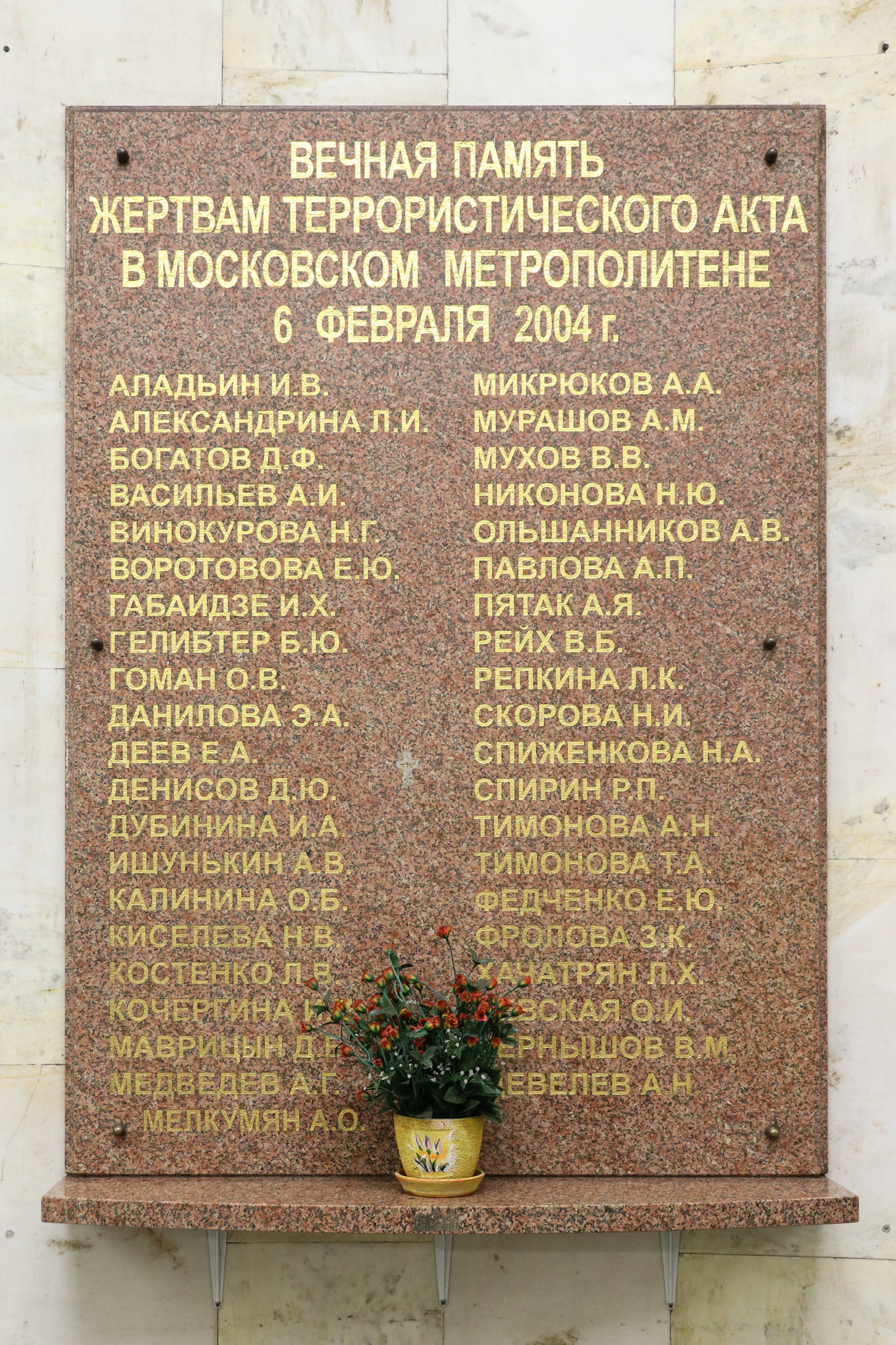 Мемориальная доска жертвам теракта 6 февраля 2004 года на станции метро Автозаводская